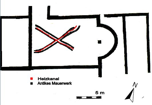 Grundriss der frühchristlichen Kirche unter der St. Laurenz Basilika in Enns (nach L. Eckhart)